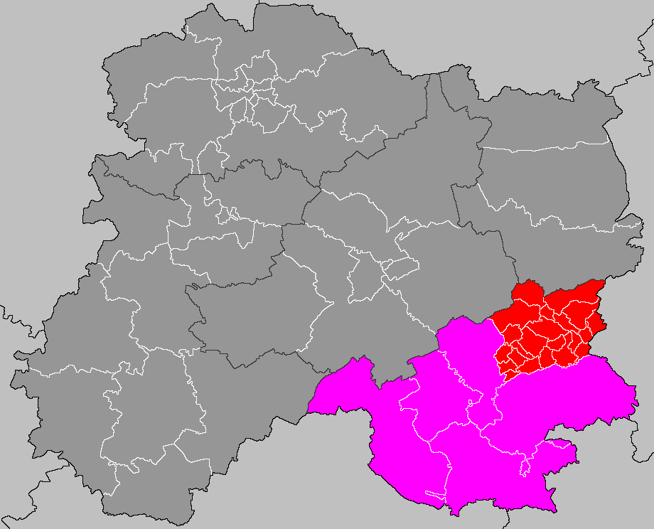 Localisation du canton d'Heiltz-le-Maurupt